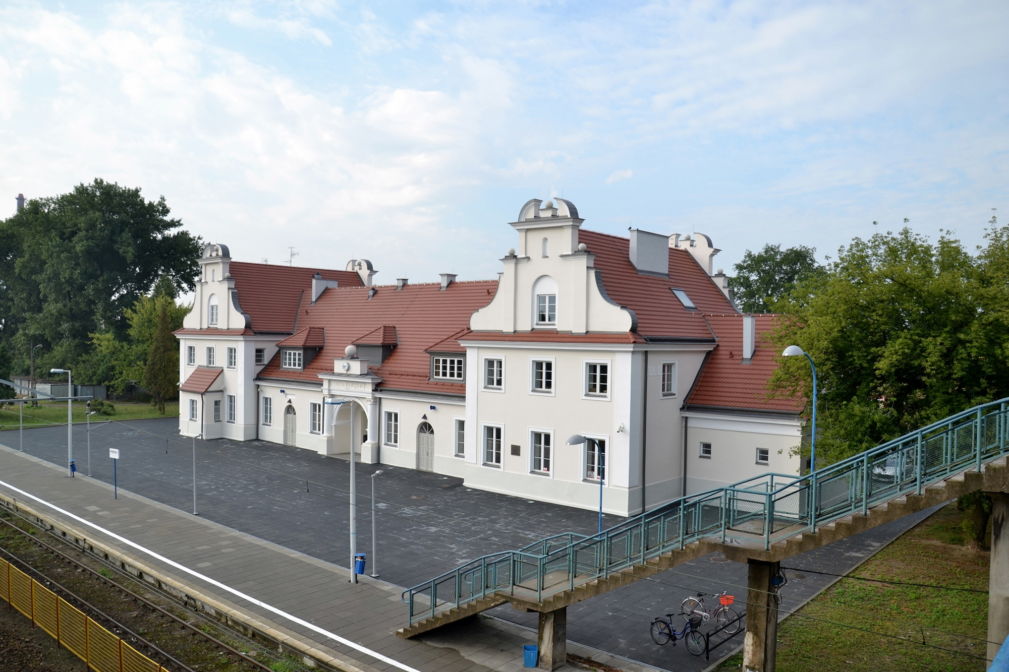 Widok z kładki na wyremontowany dworzec w Kole